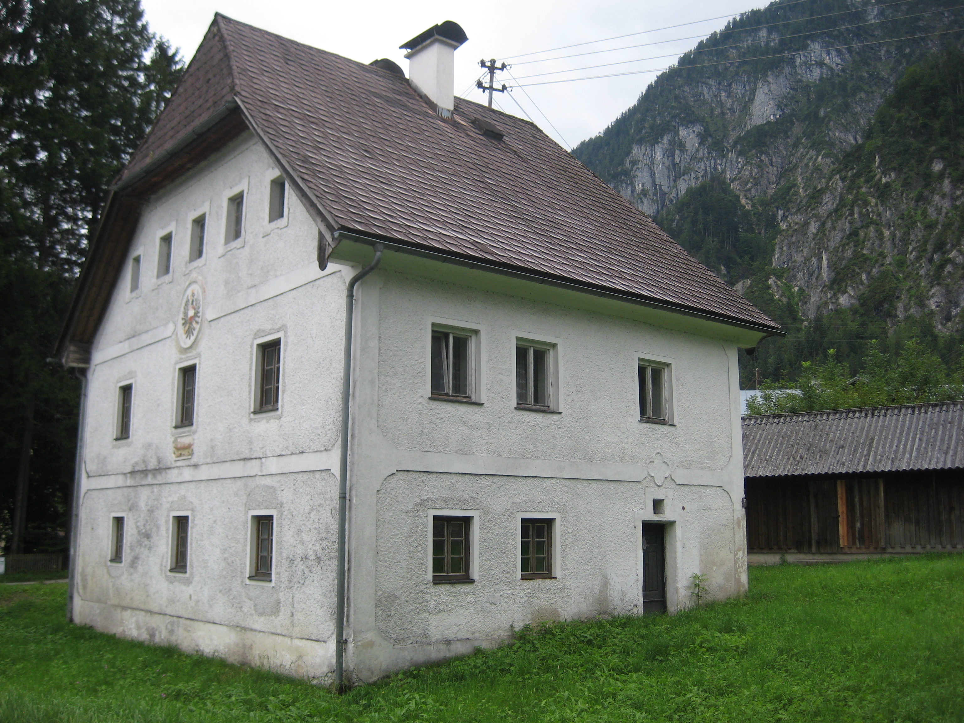 Steeger Seeklause samt Klauswärterhaus